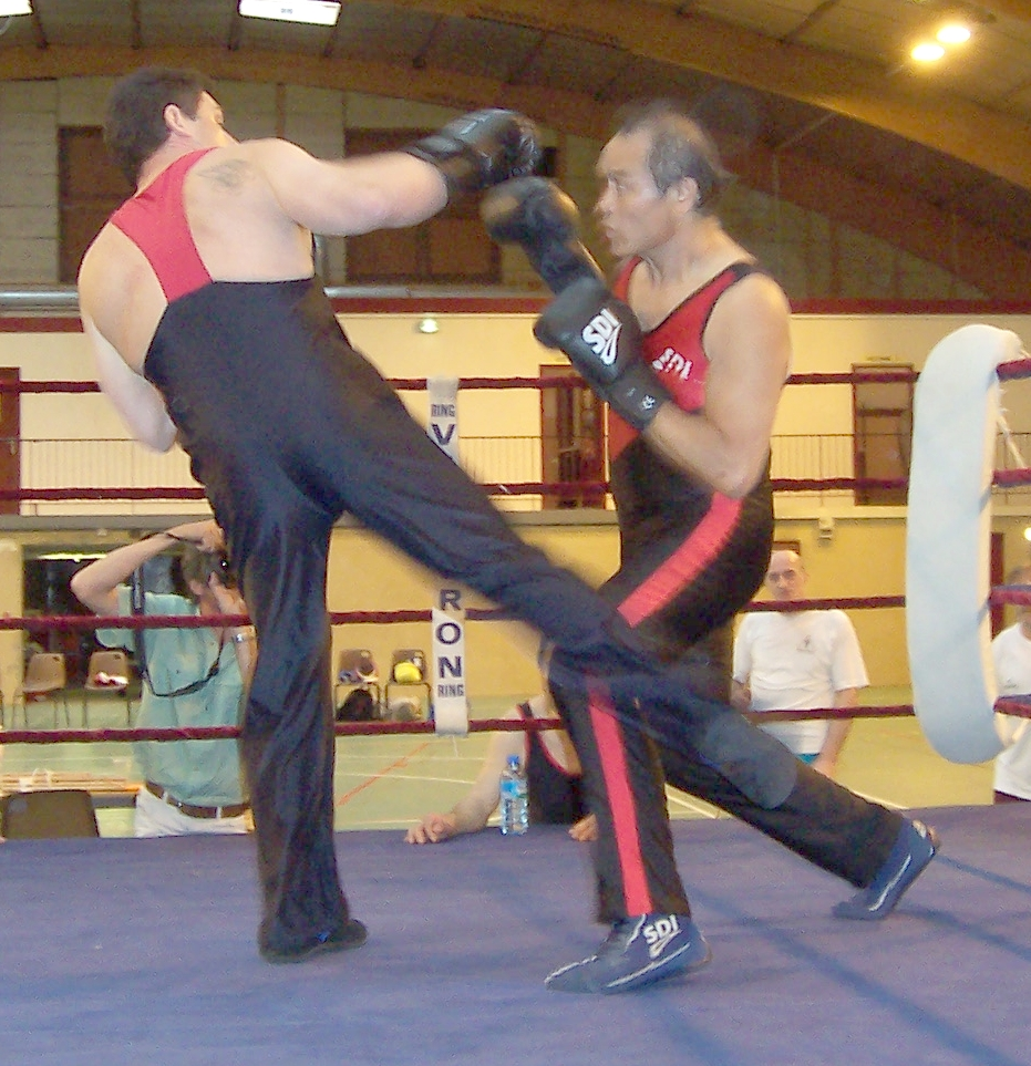 Boxe Française. Coup de pied bas.